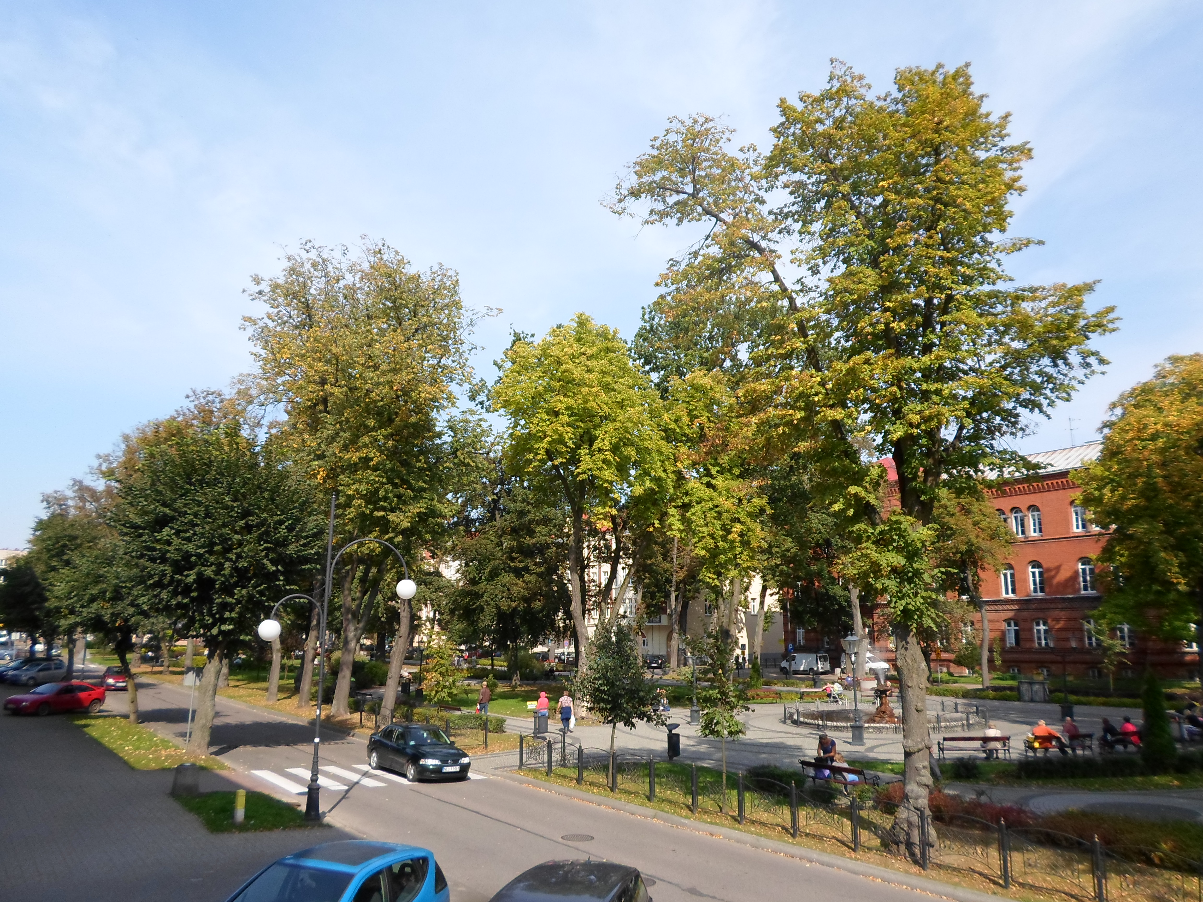 Ełk, park miejski, XIX/XX